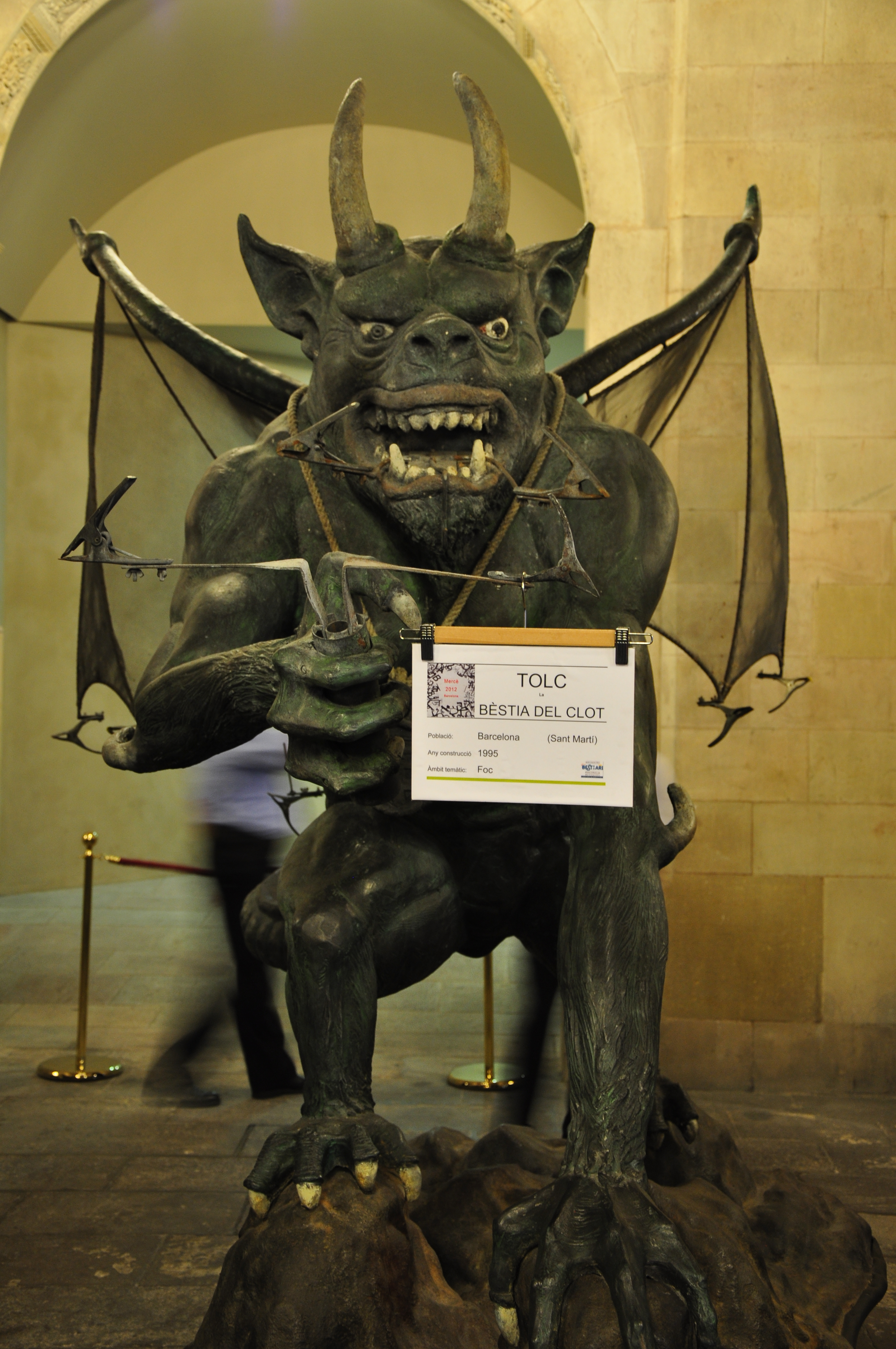 La Mercè 2012 - TOLC la Bèstia del Clot a l'Ajuntament de Barcelona.